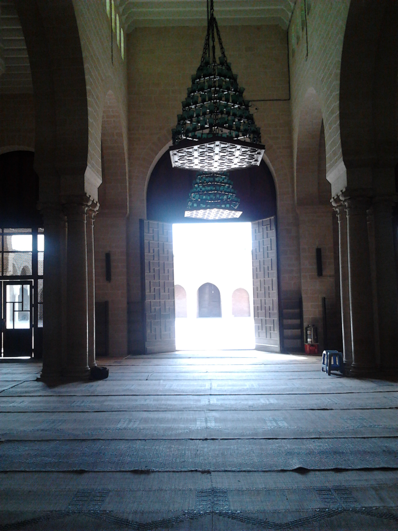 Le grand mosquée de Mahdia (mosquée Fatimide)